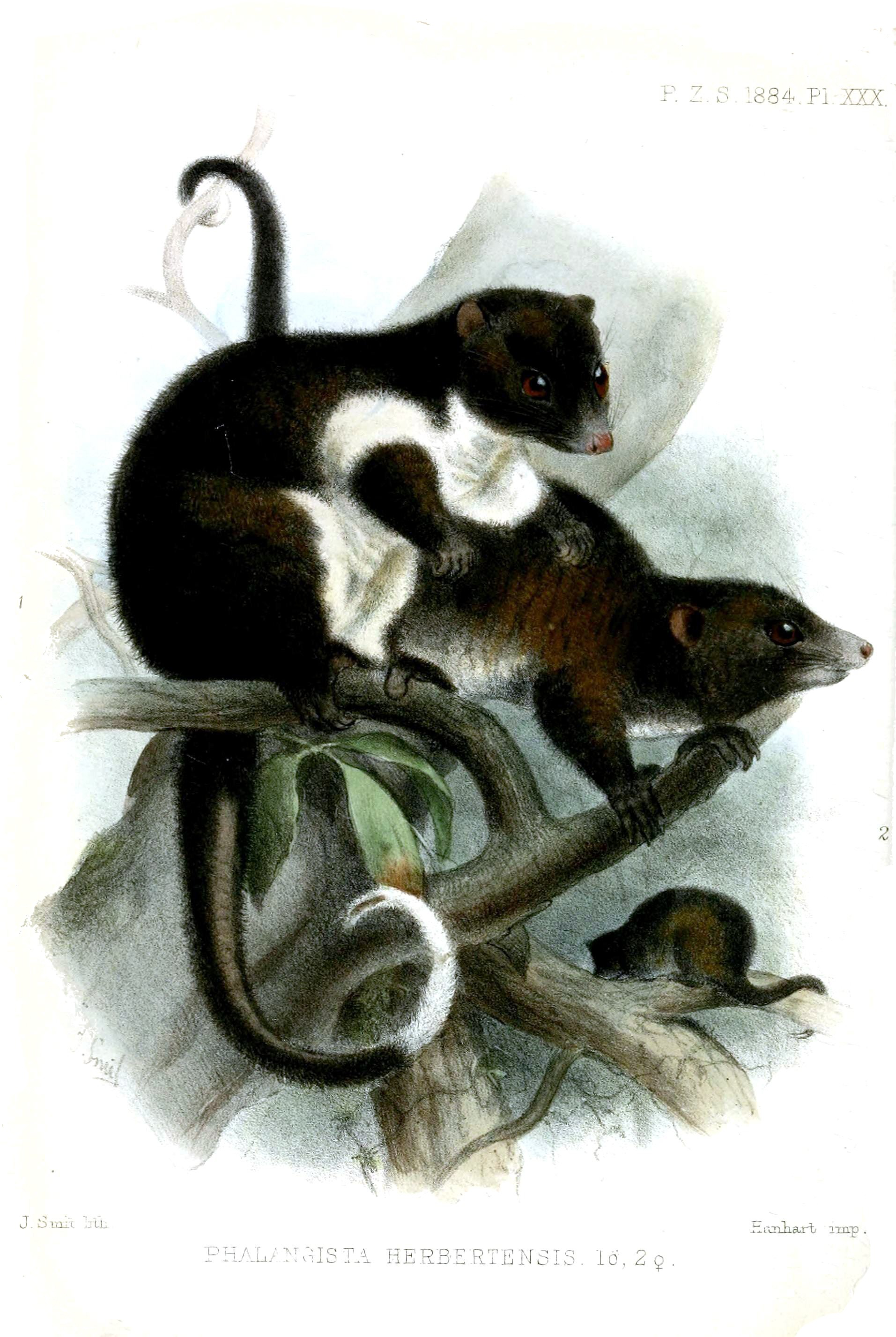 Phalangista herbertensis = (Pseudochirulus herbertensis